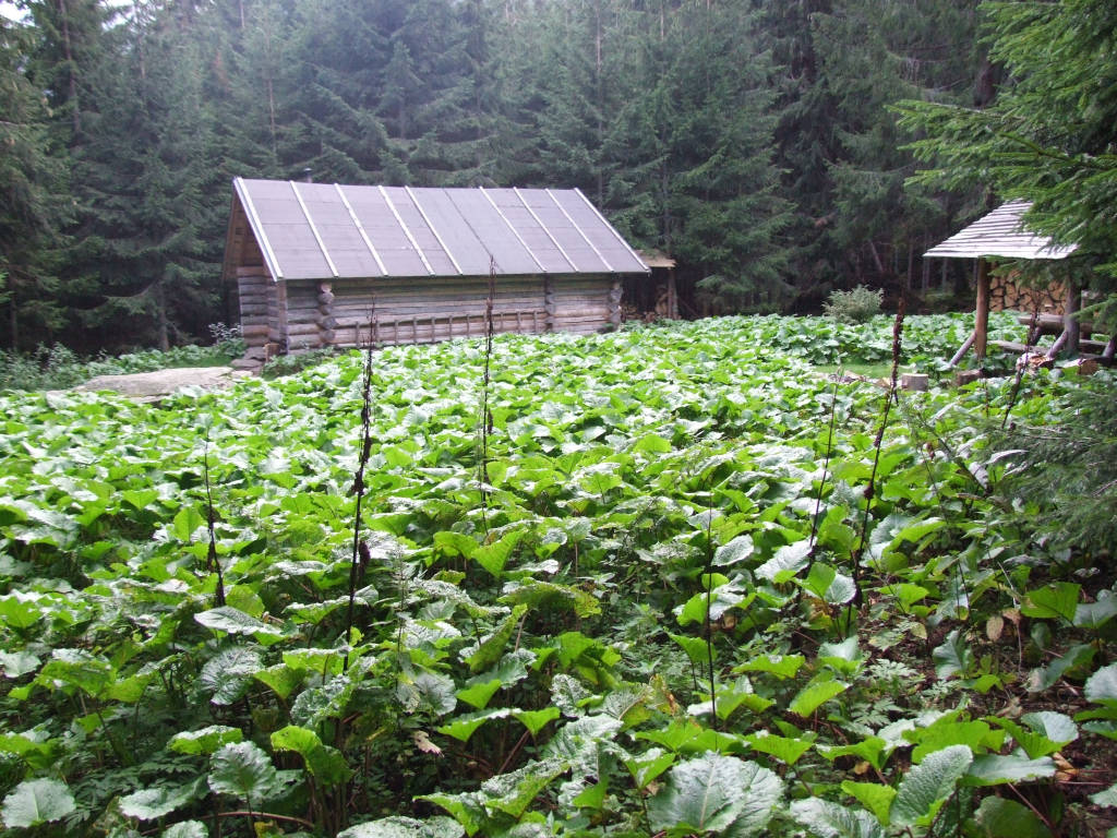 Jamnicka Dolina. Polana pod Pustem (West Tatra Mountains)